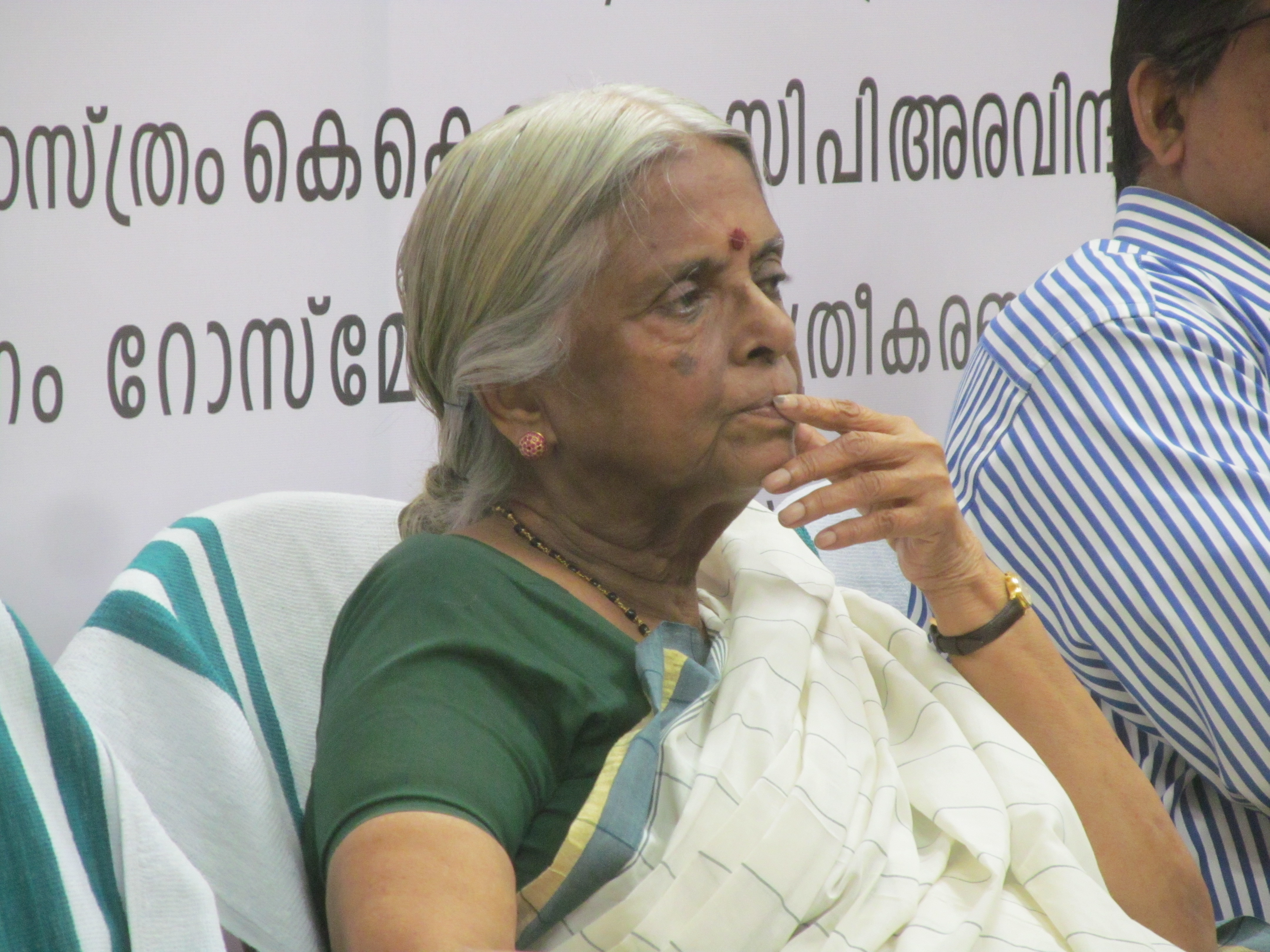 സുഗതകുമാരിടീച്ചര്‍. മലയാളത്തിലെ പ്രമുഖ കവിയും സാമൂഹ്യ-പരിസ്ഥിതിപ്രവര്‍ത്തകയും.